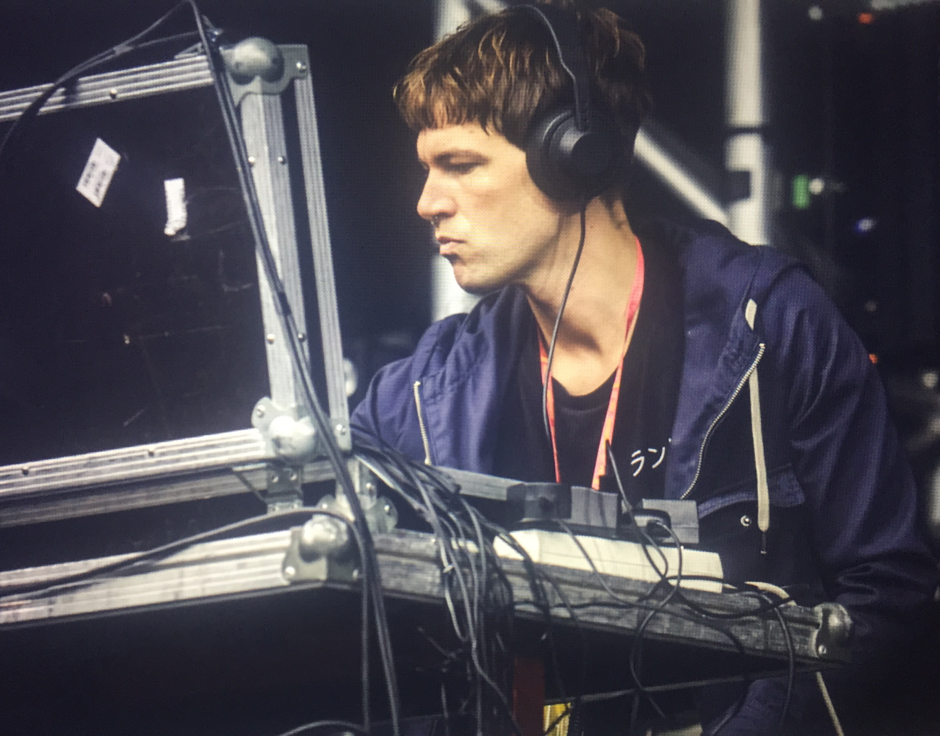 Aske Zidore performing live